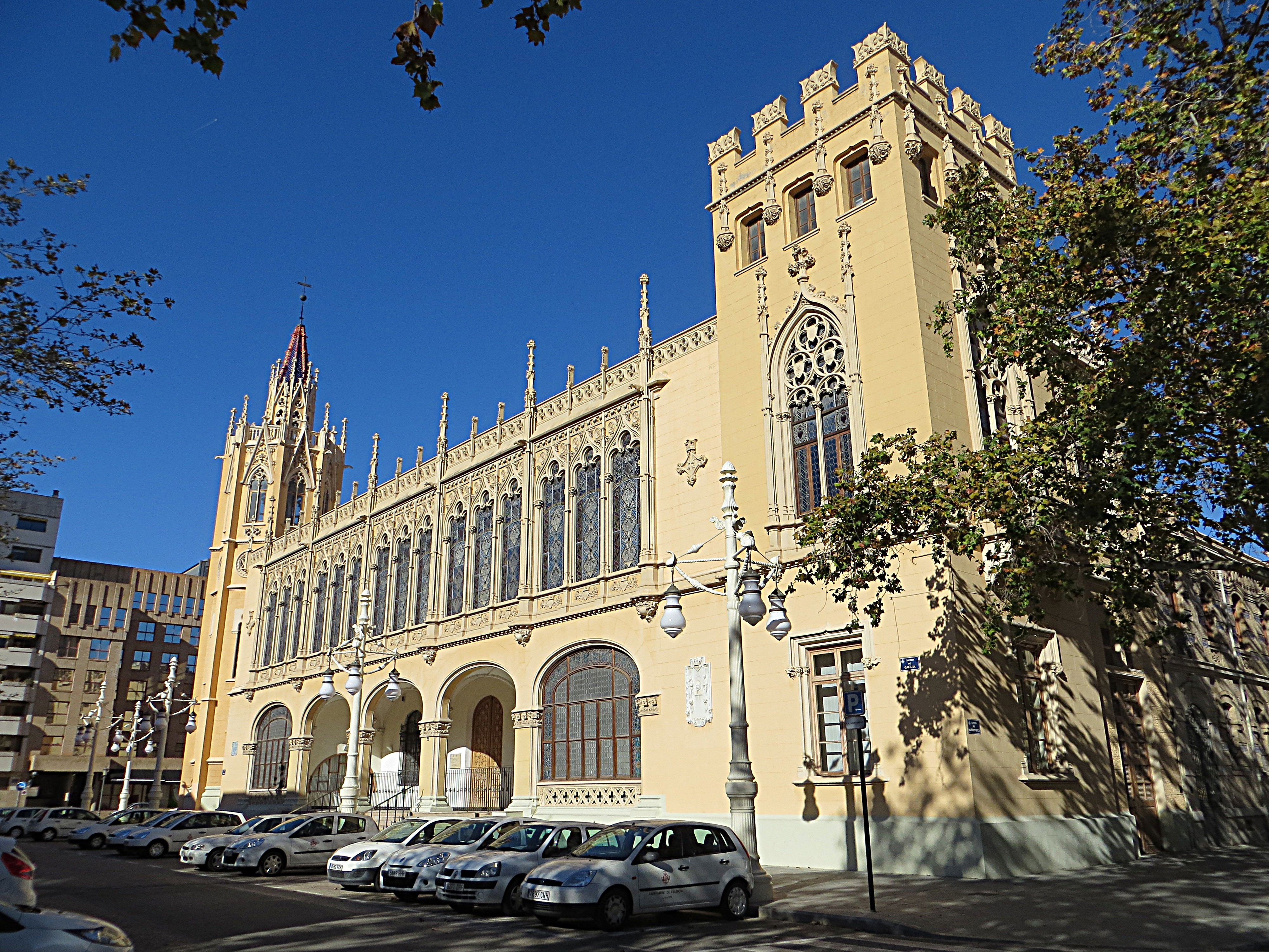 Biblioteca Municipal Palau de l'Exposicio